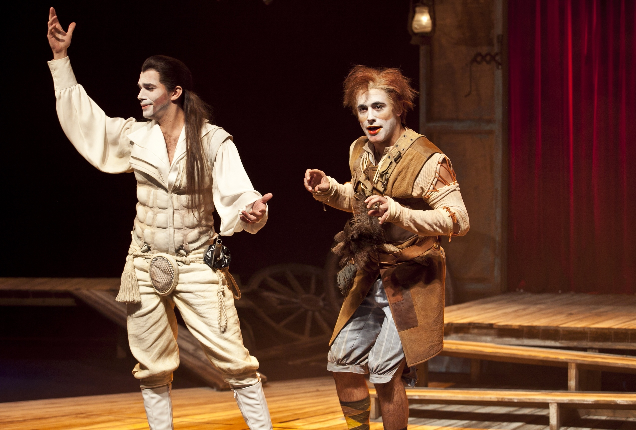 ההצגה מנדראגולה, בבימויו של גלעד קמחי, עיצוב תלבושות של אולה שבצוב, עיצוב תפאורה ערן עצמון, עיצוב תאורה קרן גרנק, תיאטרון בית ליסין, 2011